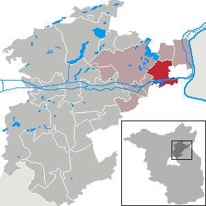 Oderberg in Brandenburg (Country) - District Barnim